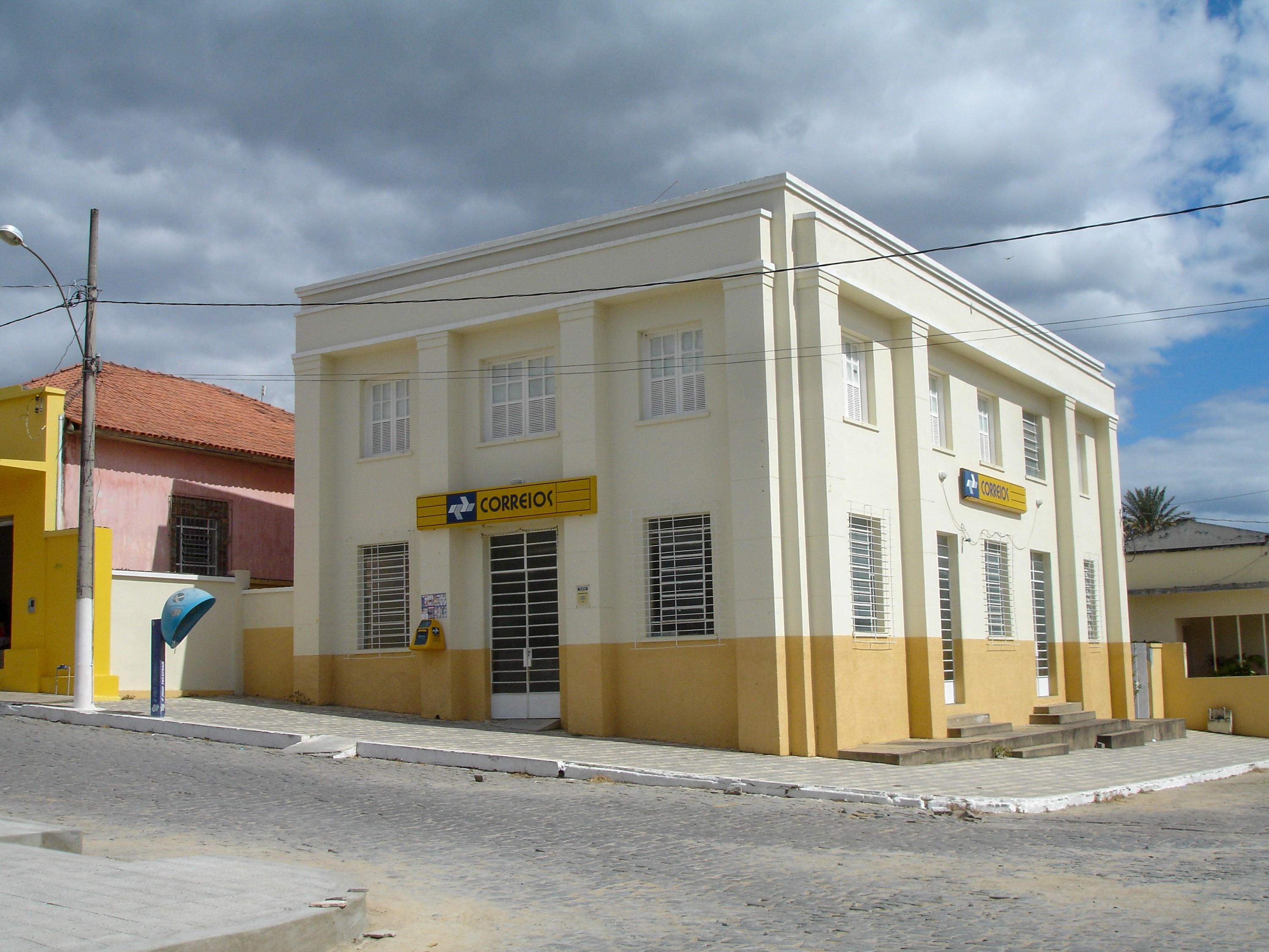 Foto em 2011 do prédio dos Correios (Empresa Brasileira de Correios e Telégrafos - ECT) em Rubim/MG em frente a Praça Ubirajara Coelho de CEP 39950-970.